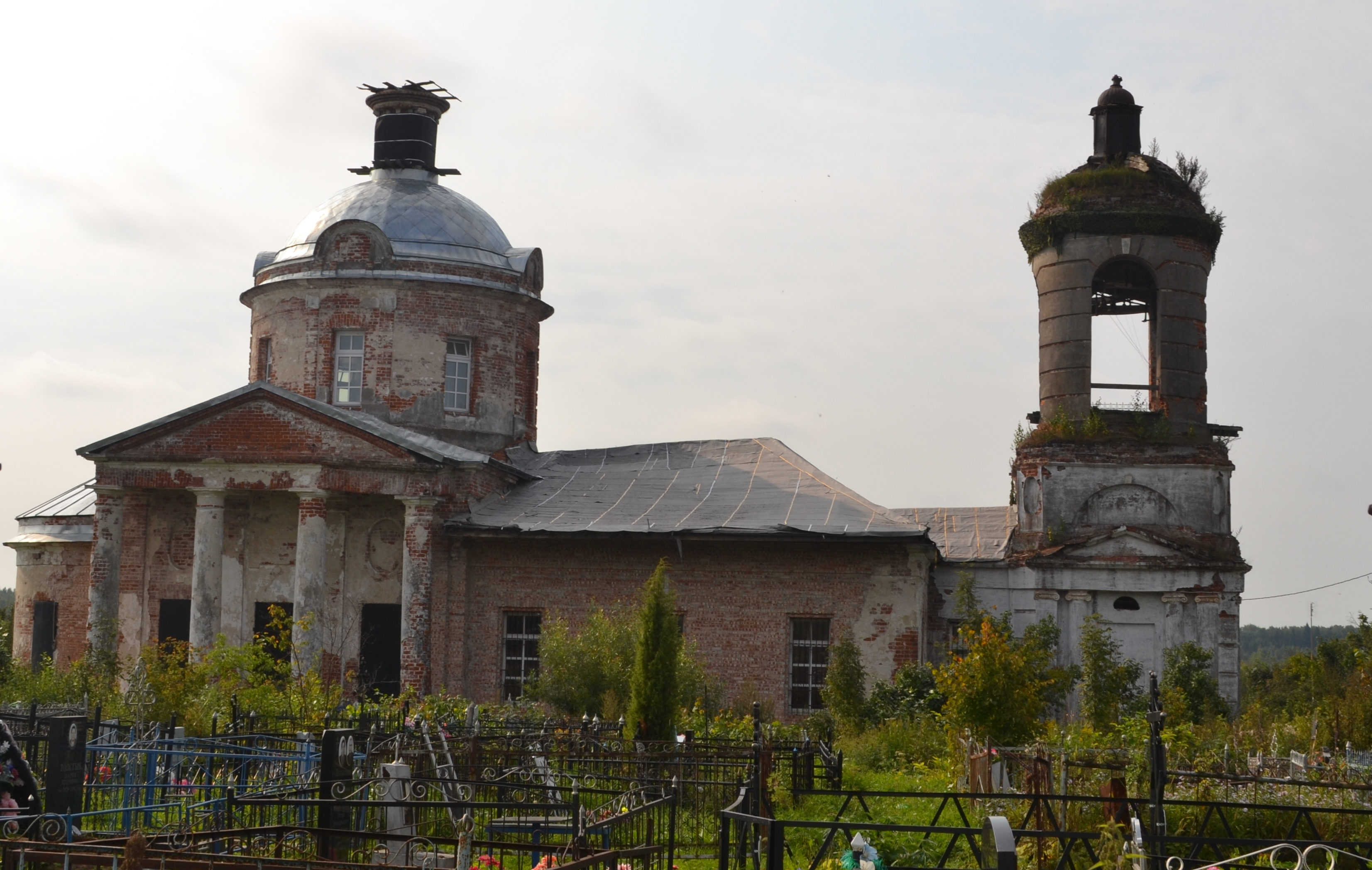 Церковь Бориса и Глеба: Волохово, Александровский район, Владимирская область